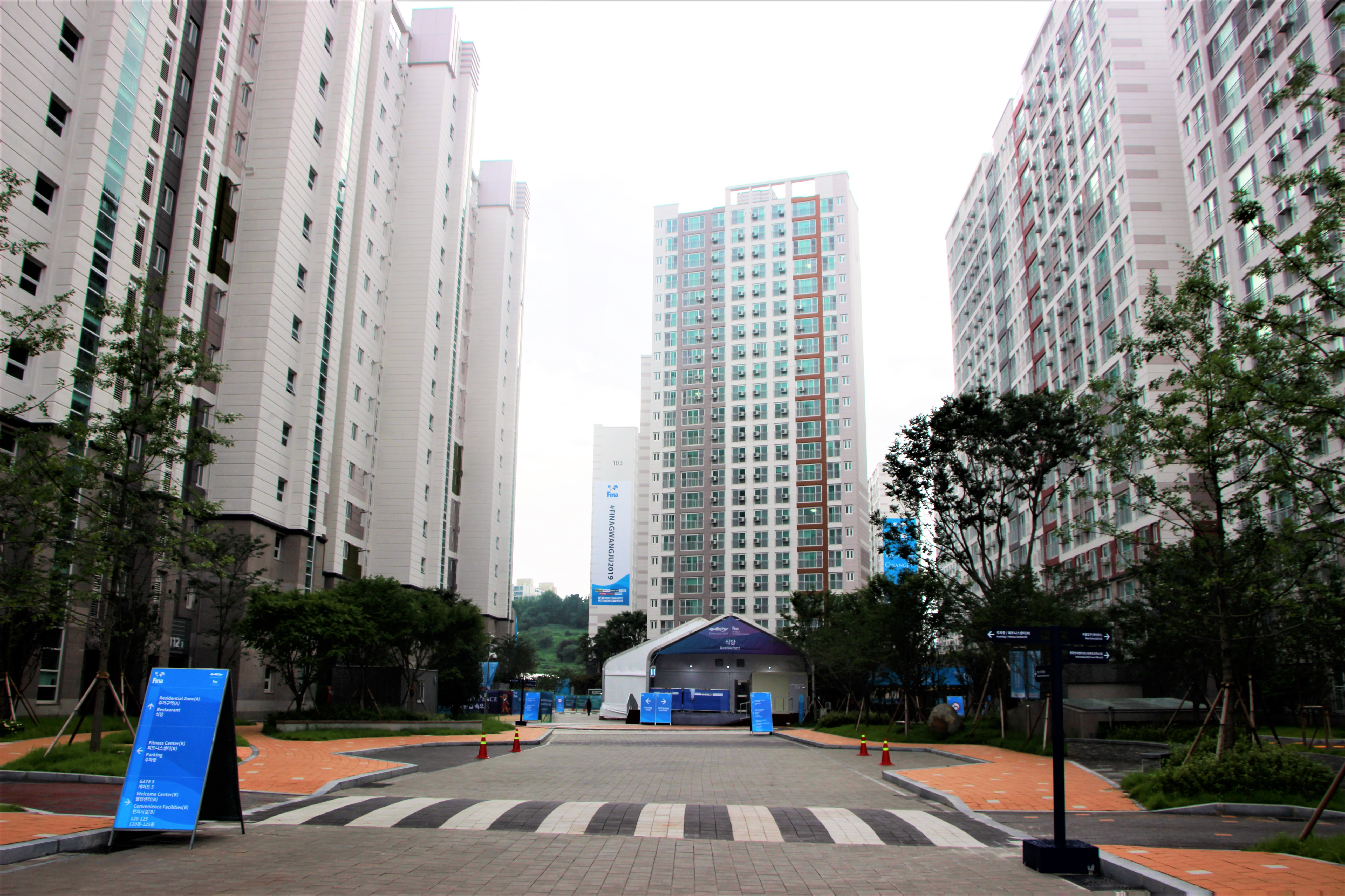 2019 광주FINA세계수영선수권대회 선수촌으로 활용되었던 광주 우산동 중흥S클래스 아파트.